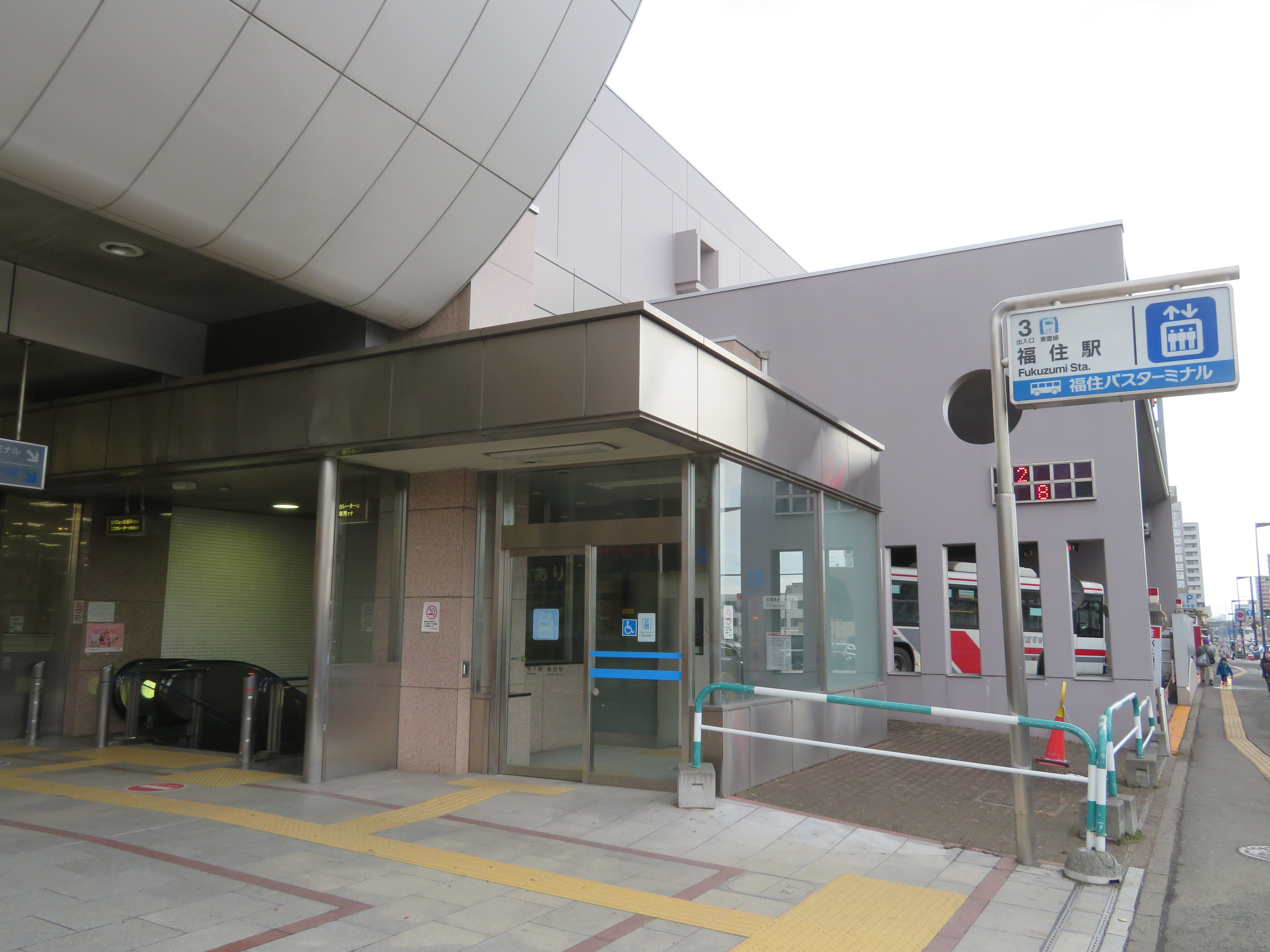 福住駅3番出入口